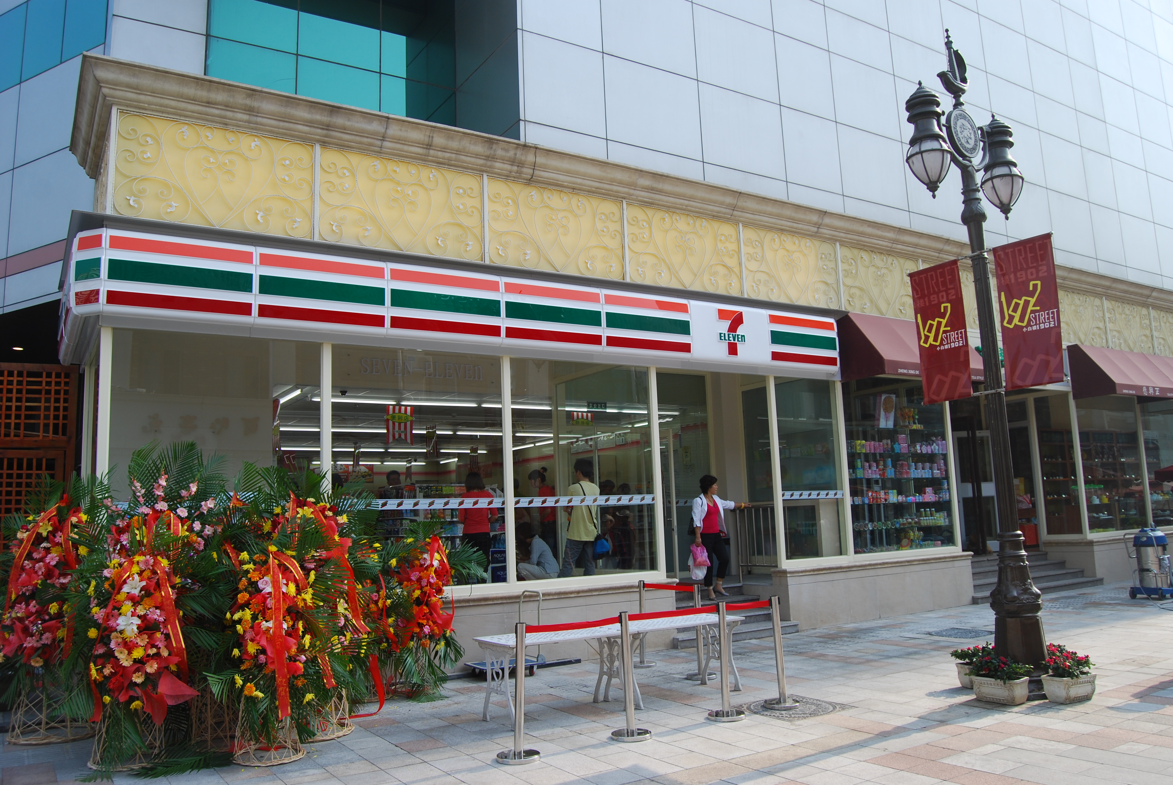 7-11便利店